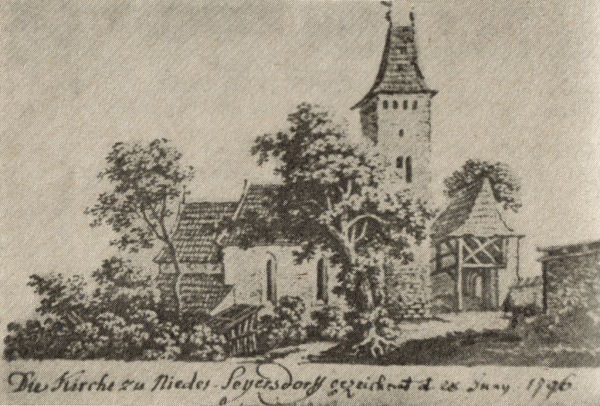 Die Federzeichnung der Nieder Seifersdorfer Kirche (Landkreis Görlitz) von Johann Gottfried Schultz aus dem Jahr 1796 gilt als die vermutlich älteste Darstellung der Kirche.